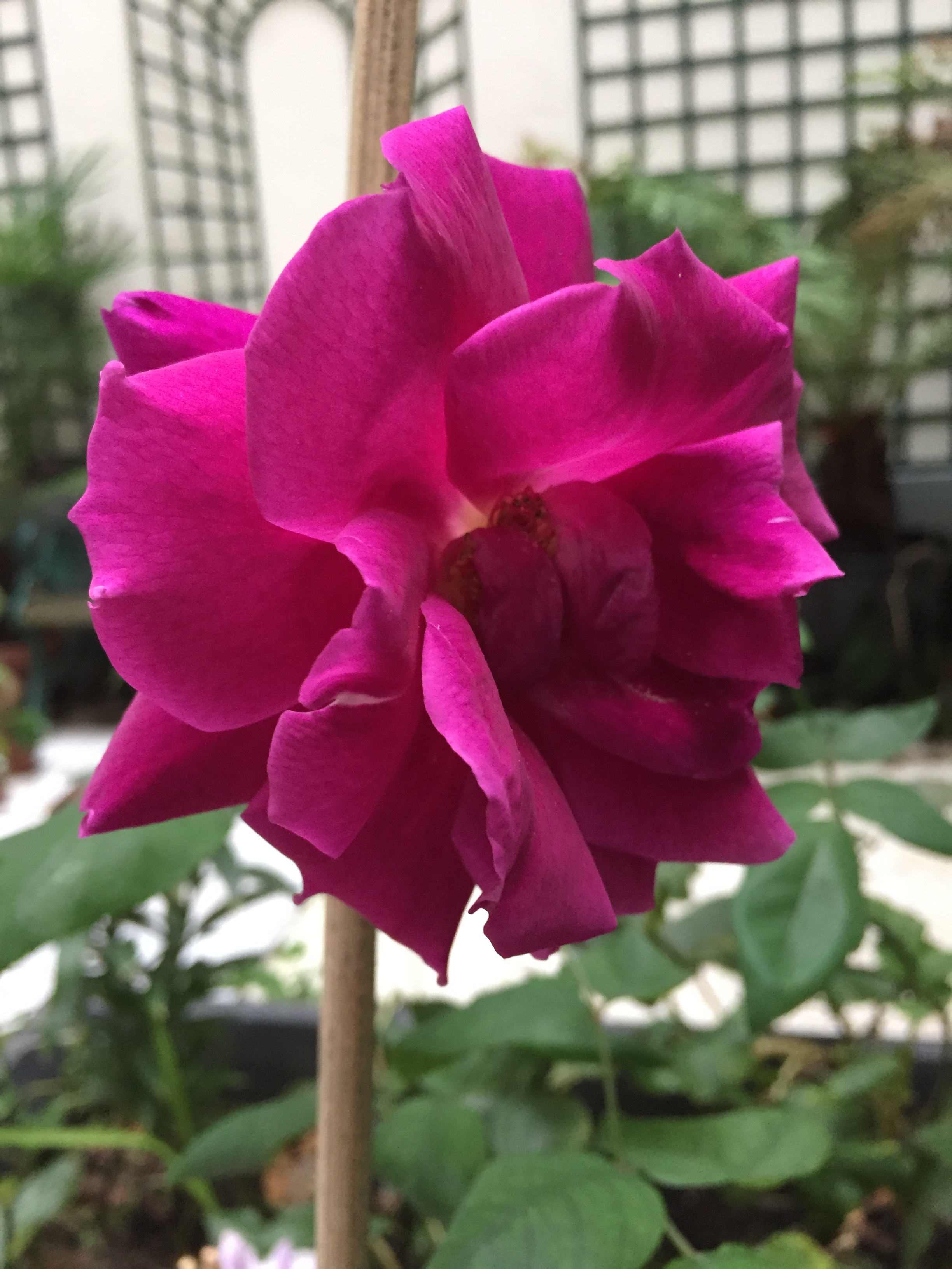 'Madame Georges Petit' rosier buisson